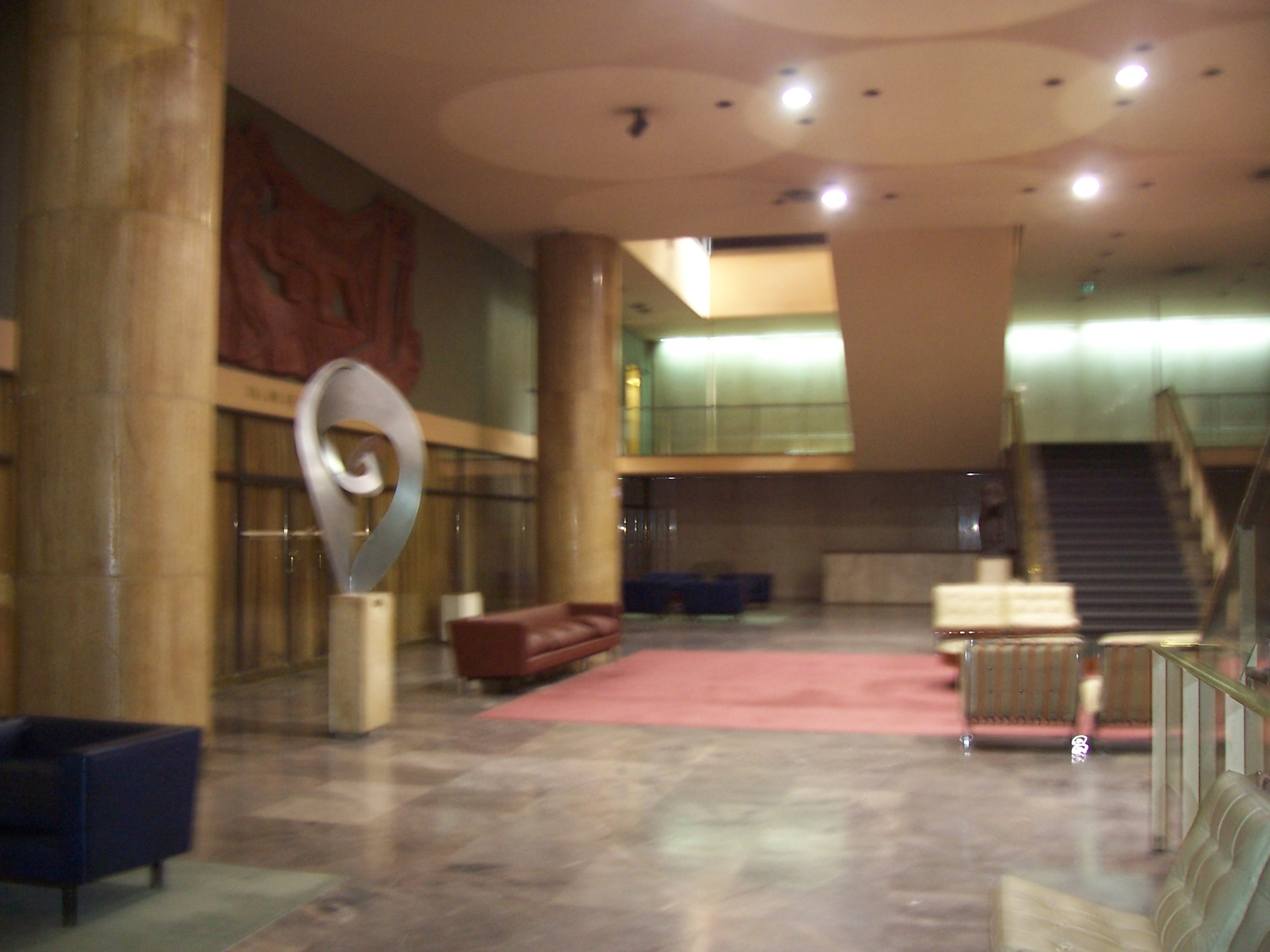 Interior del Teatro San Martín. Buenos Aires, Argentina.